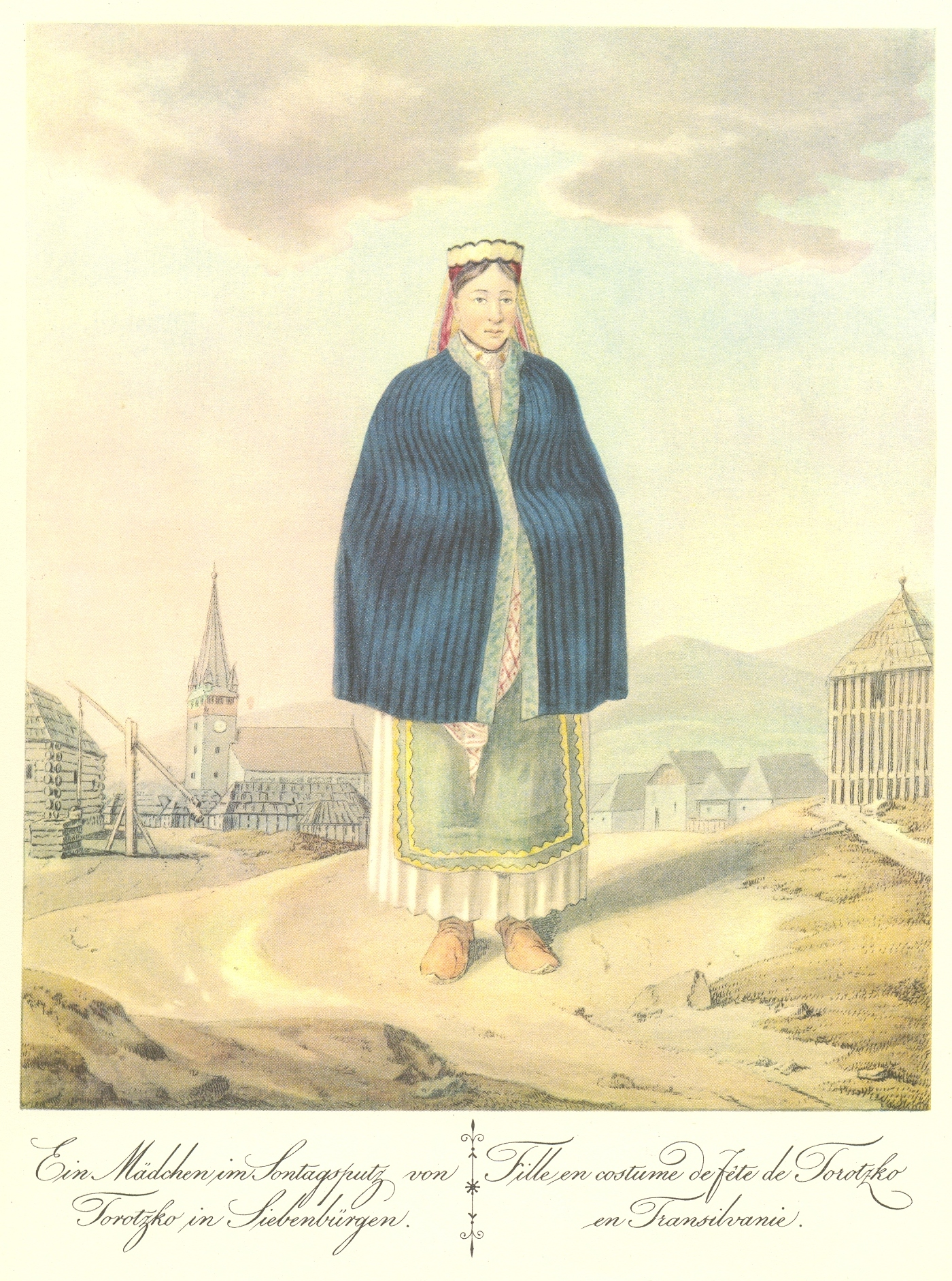 Rimetea, femeie în port naţional (1821).